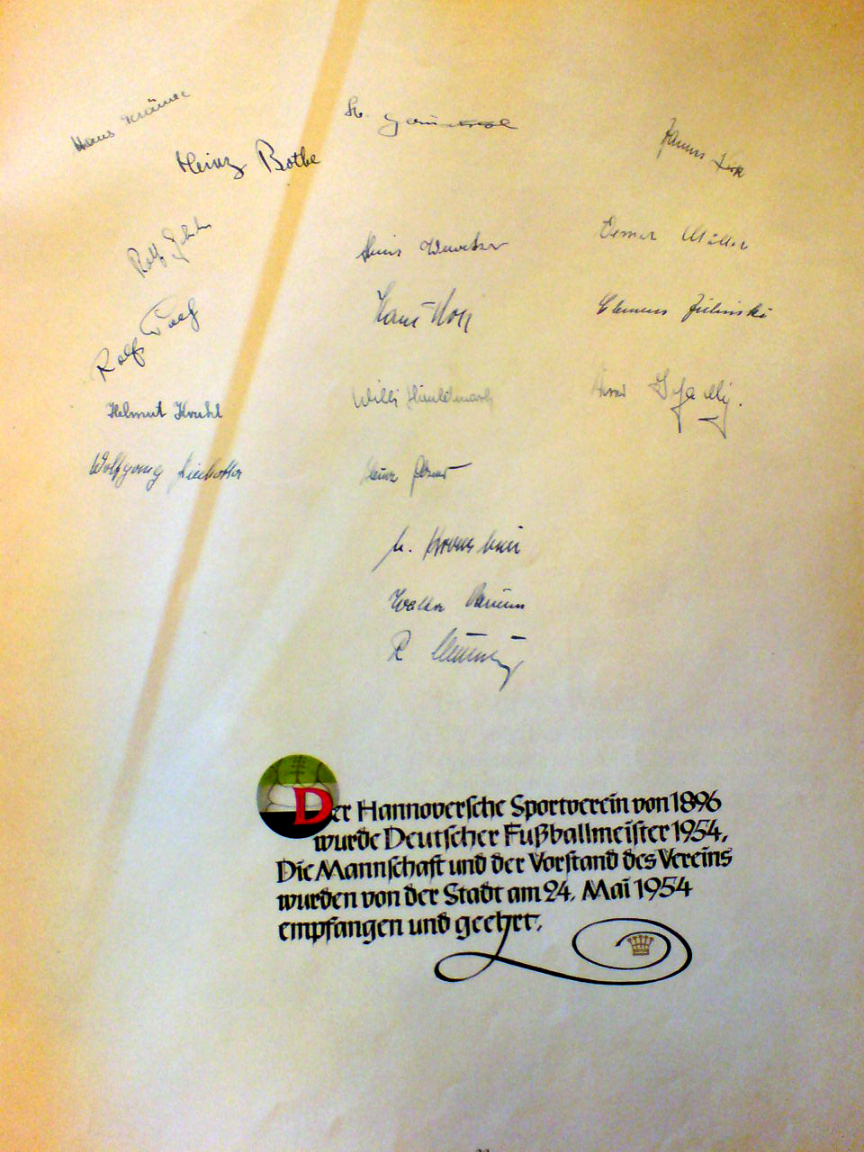 Goldenes Buch (Hannover): "Der Hannoversche Sportverein von 1896 wurde Deutscher Fußballmeister 1954. Die Mannschaft und der Vorstand des Vereins wurden von der Stadt am 24. Mai 1954 empfangen und geehrt."